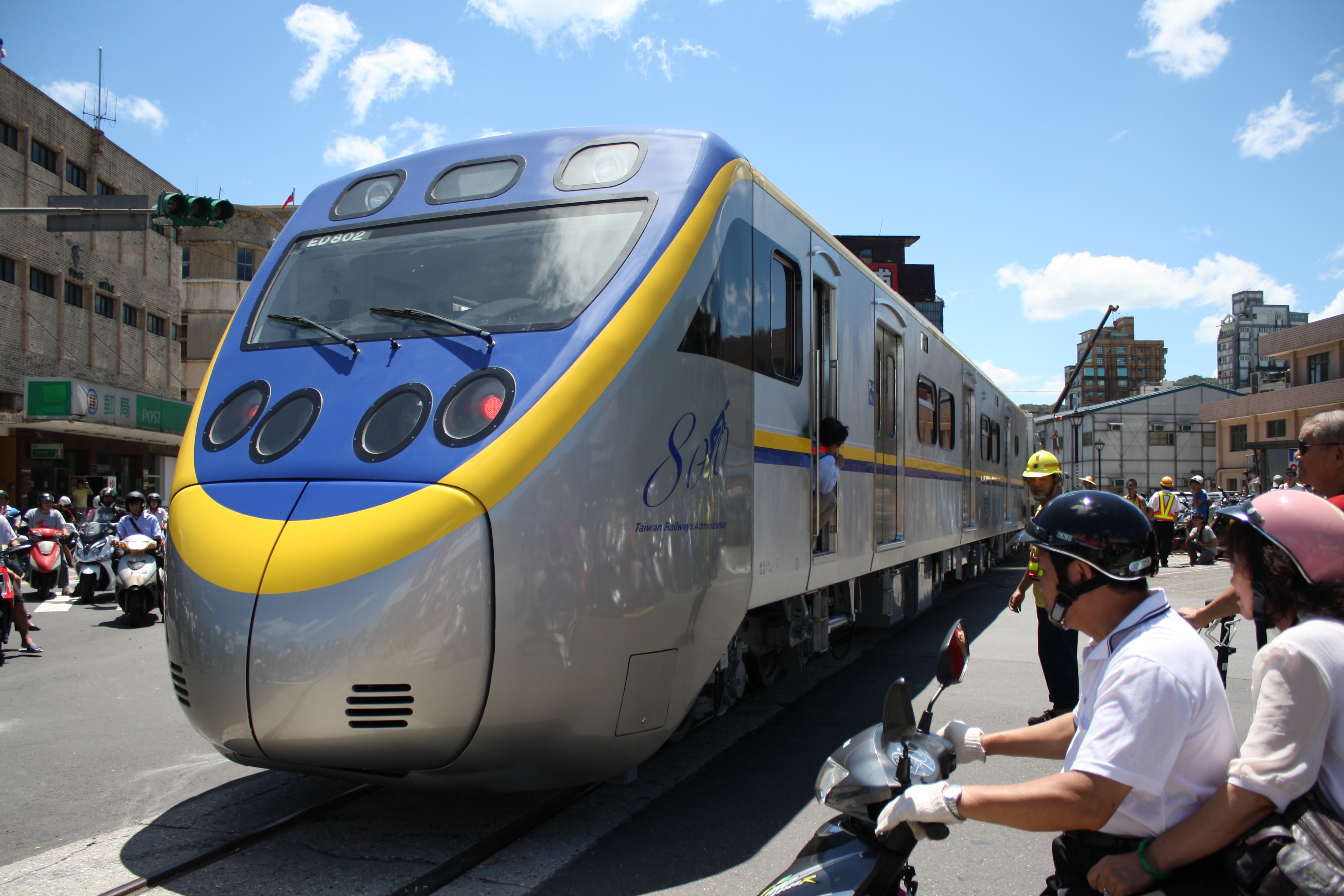 台灣鐵路局(路局)採購之EMU800列車(日本車輛示範組裝版)